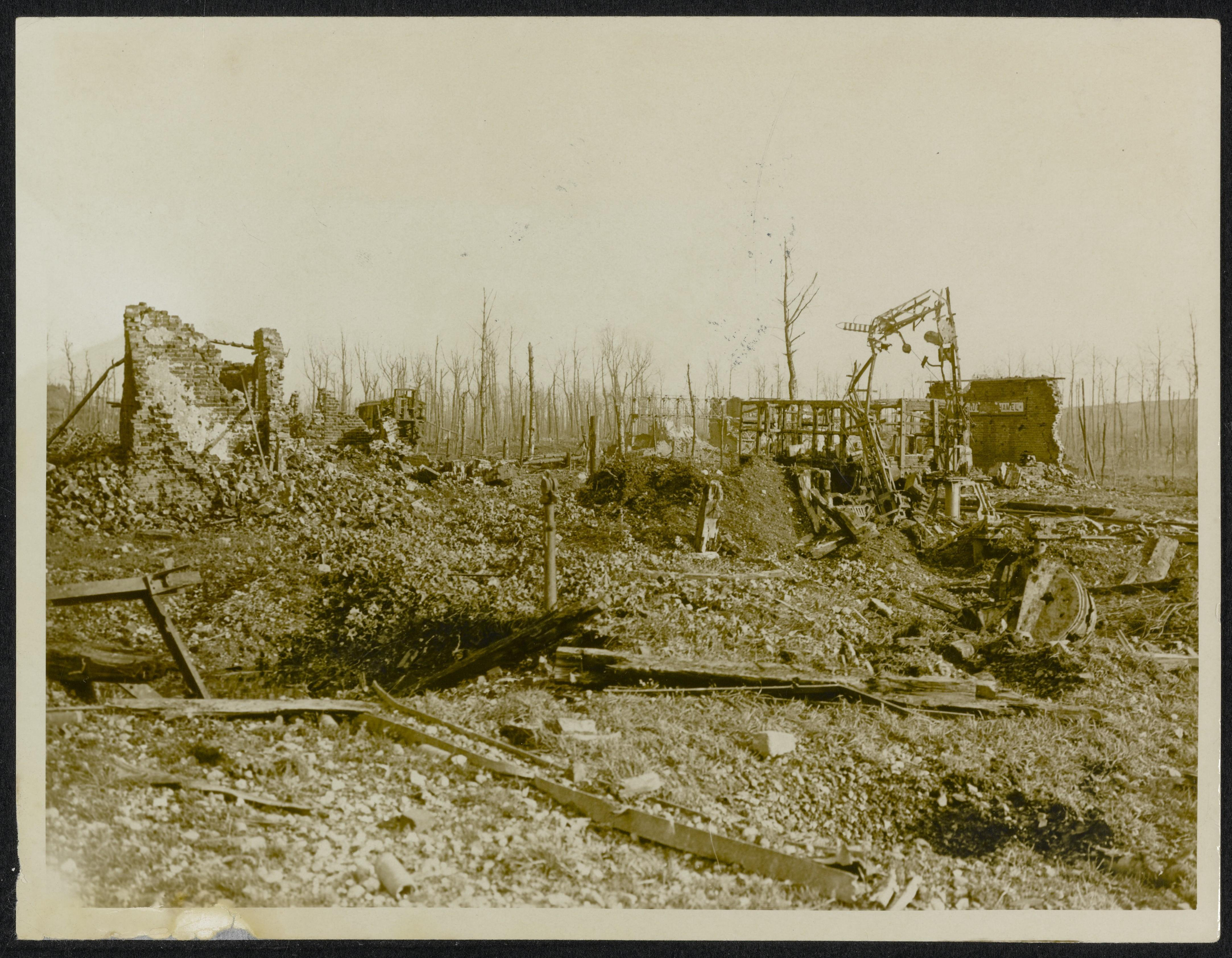 Collectie / Archief : Fotocollectie Eerste Wereldoorlog Reportage / Serie : The British advance in the West Beschrijving : Railway Station at Beaumont Hamel. Annotatie : De Britse opmars in het Westen. Het totaal verwoeste station van Beaumont Hamel. Datum : {1914-1918} Locatie : Beaumont-Hamel, Frankrijk Trefwoorden : dorpen, eerste wereldoorlog, fronten, spoorwegen, verwoestingen Fotograaf : The Press Bureau Auteursrechthebbende : Public Domain logo Materiaalsoort : Foto (zwart/wit) Nummer archiefinventaris : bekijk toegang 2.24.09 Bestanddeelnummer : 158-1426